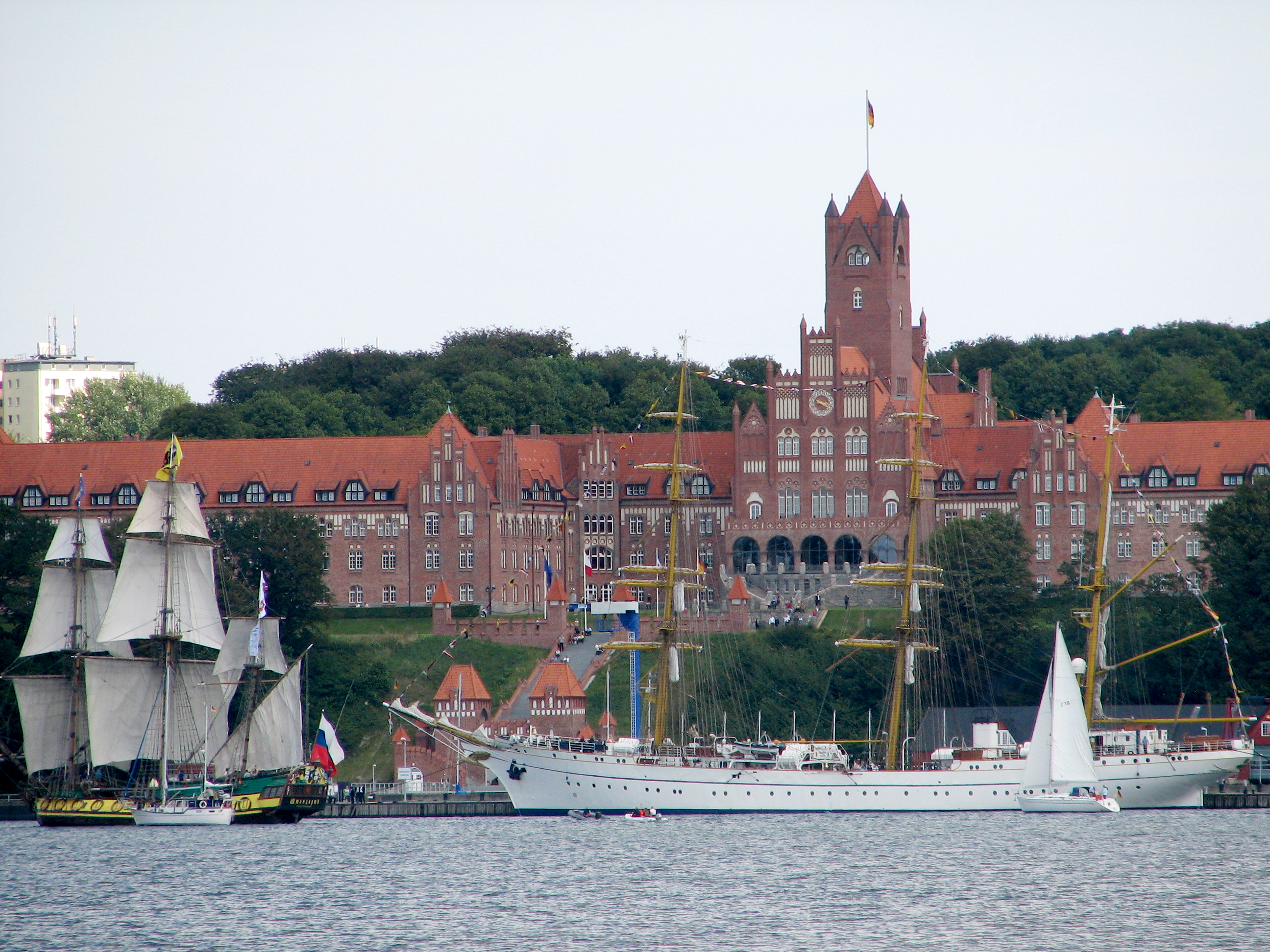 Gorch Fock und Shtandart vor dem Roten Schloss MSM (Flensburg-Mürwik August 2010 zur Nautics), Bild 02